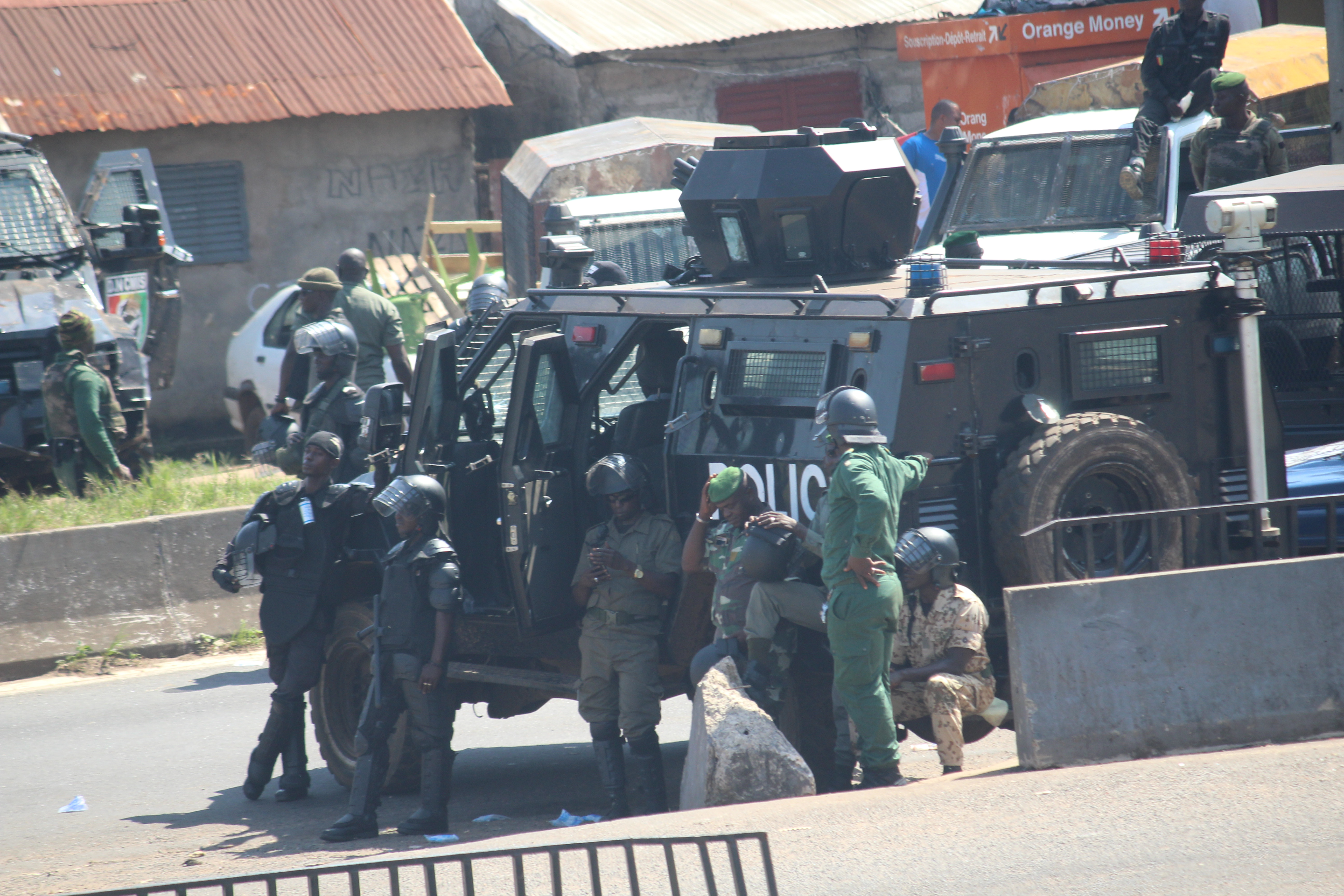 Police a la marche du FNDC This is an image with the theme "Africa on the Move or Transport" from: Guinea